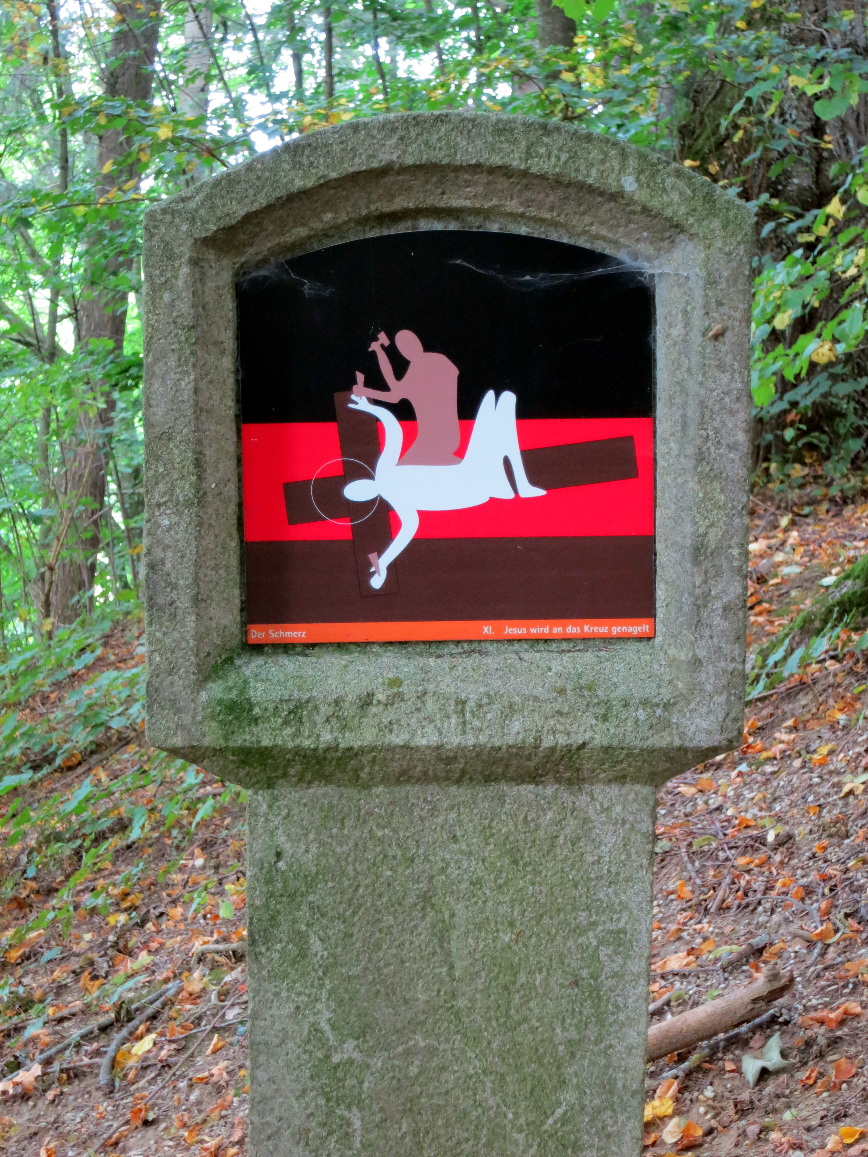 Kalvarienberg, östlich von Altomünster, Detail Kreuzwegstation